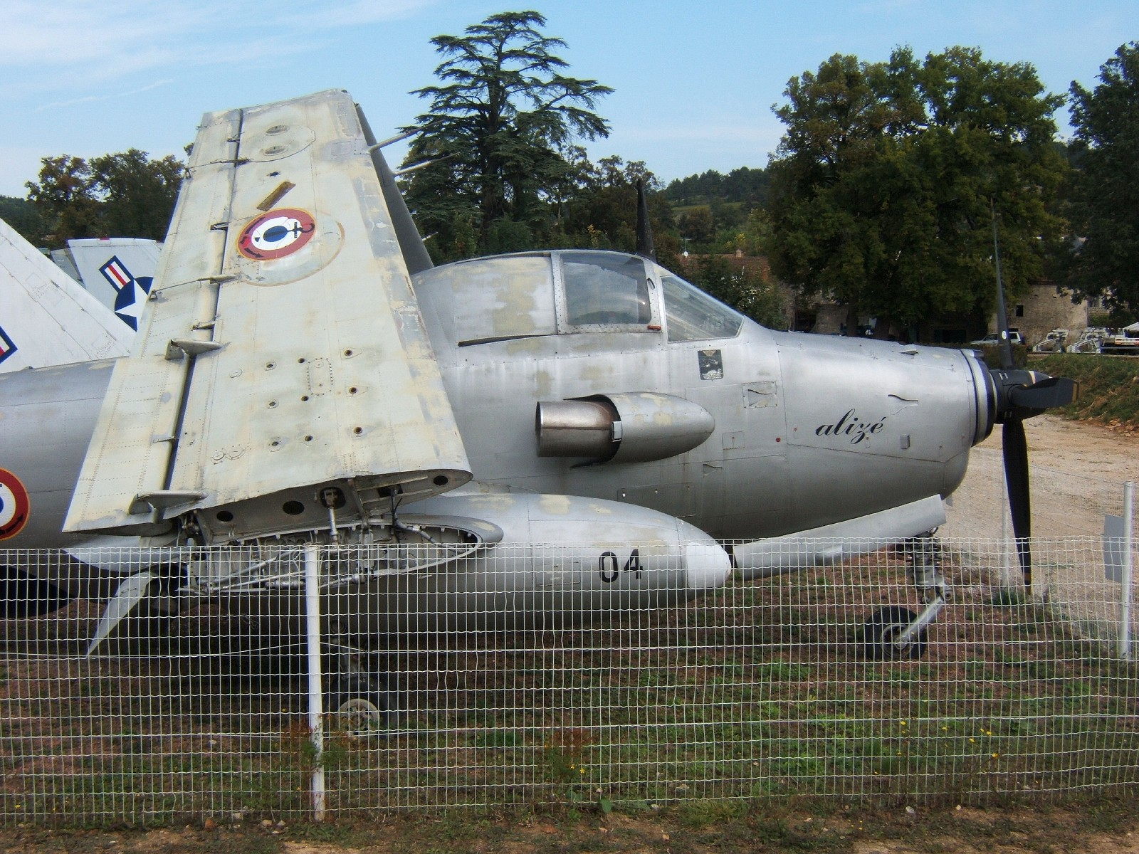 Breguet Alizé conservé au musée du château de Savigny-les-Beaunes